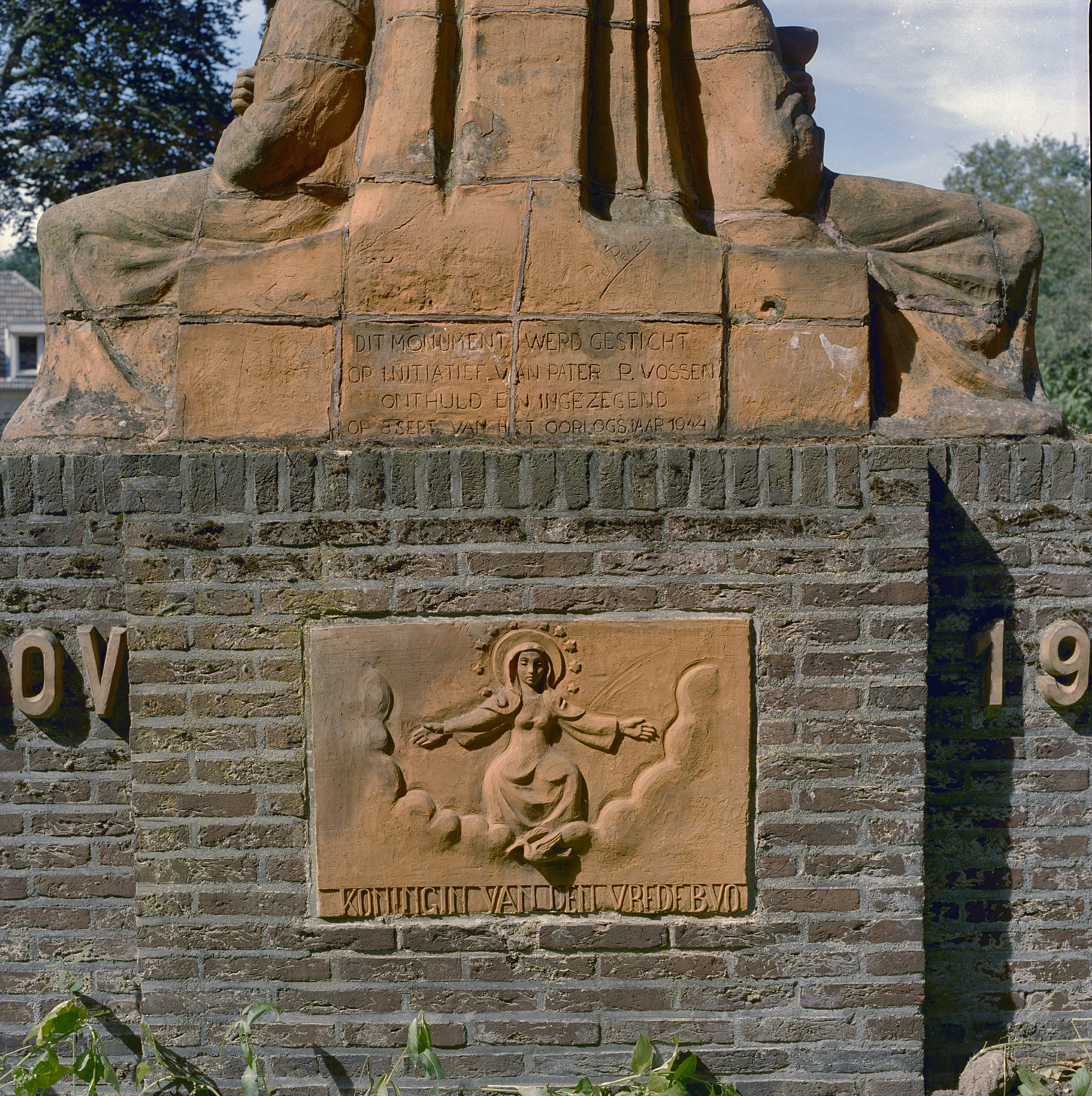 Kasteel De Raay: Exterieur Heilig Hartbeeld, detail